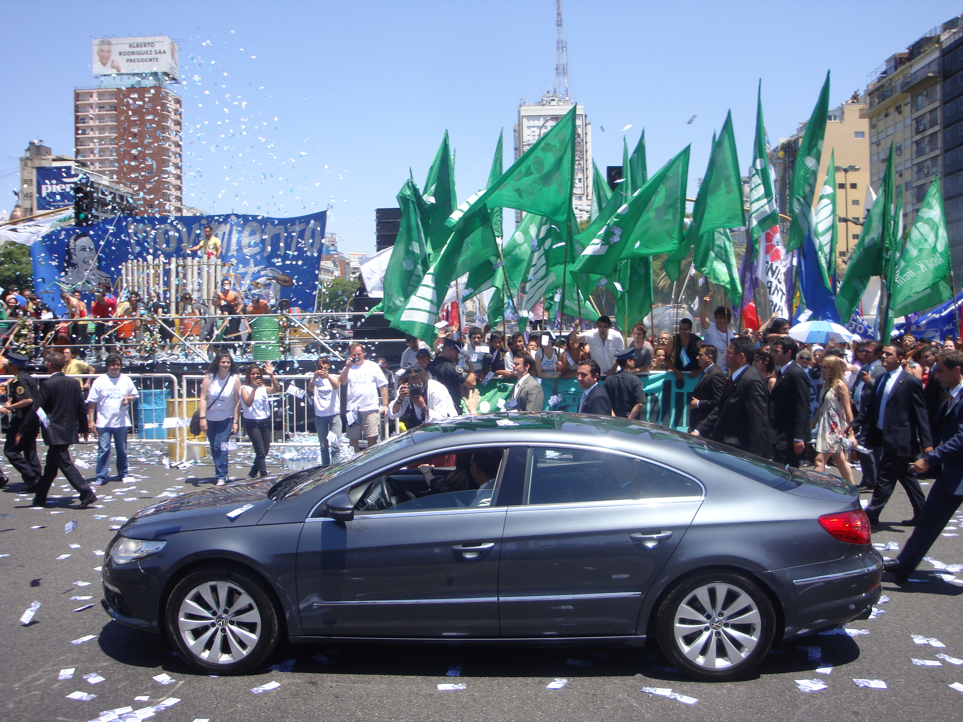 Cristina Fernández de Kirchner, tras asumir su segundo mandato, dirigiendose desde el Congreso de la Nación hacia la Casa Rosada.